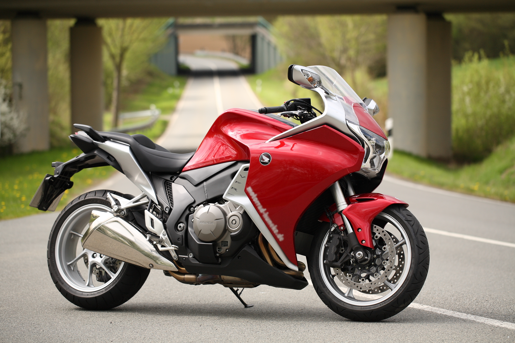 Honda VFR 1200 F, Bj.2010, Farbvariante: Candy Prominence Red